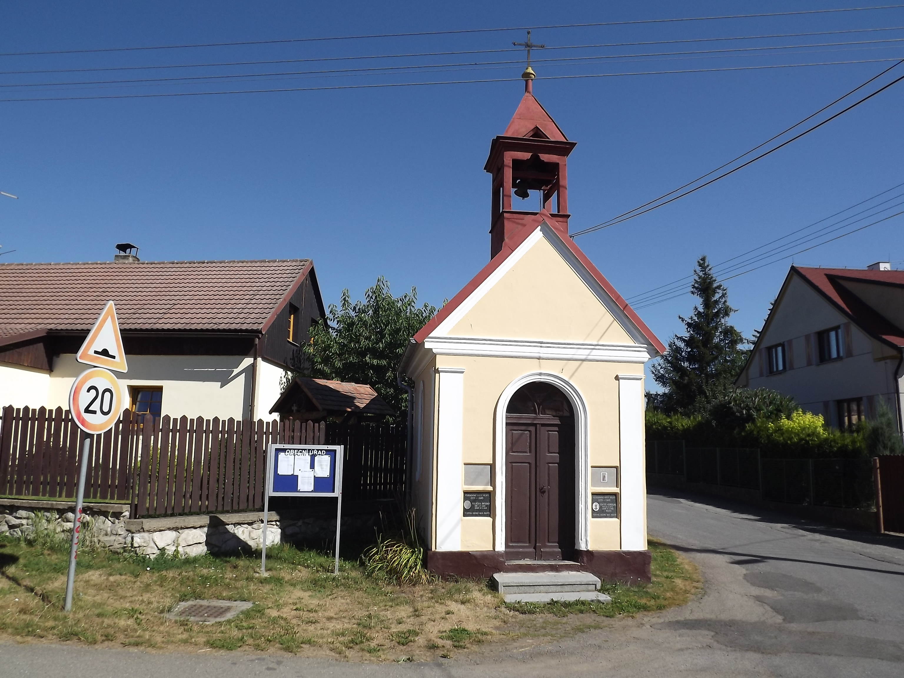 kaple